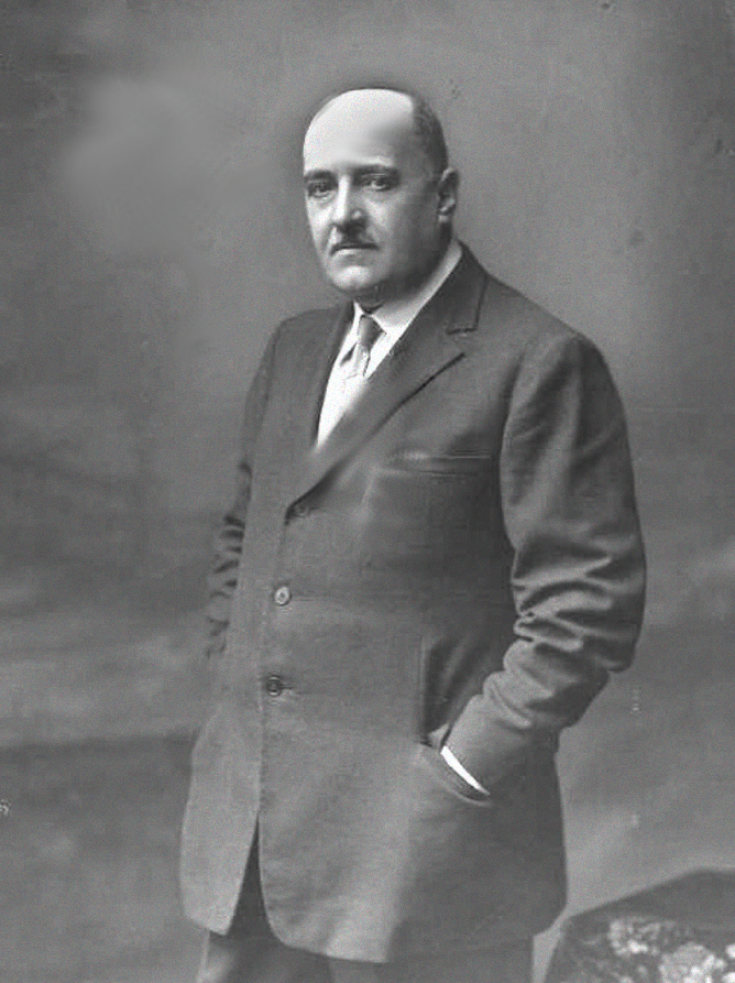 Belitska Sándor (Lajosfalva, 1872. április 1. – Budapest, 1939. december 7.) altábornagy, honvédelmi miniszter.